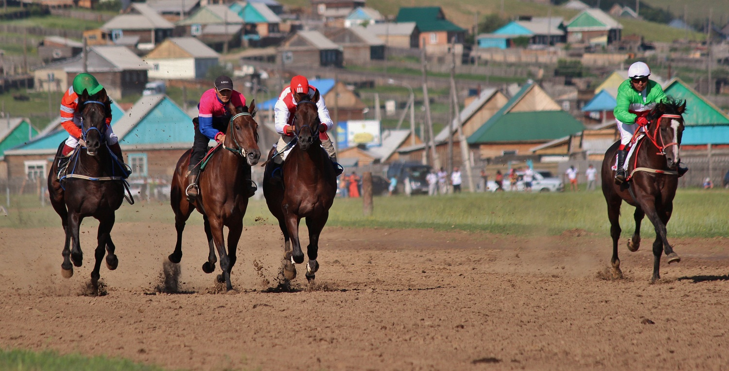 Конные скачки - бурятский национальный вид спорта